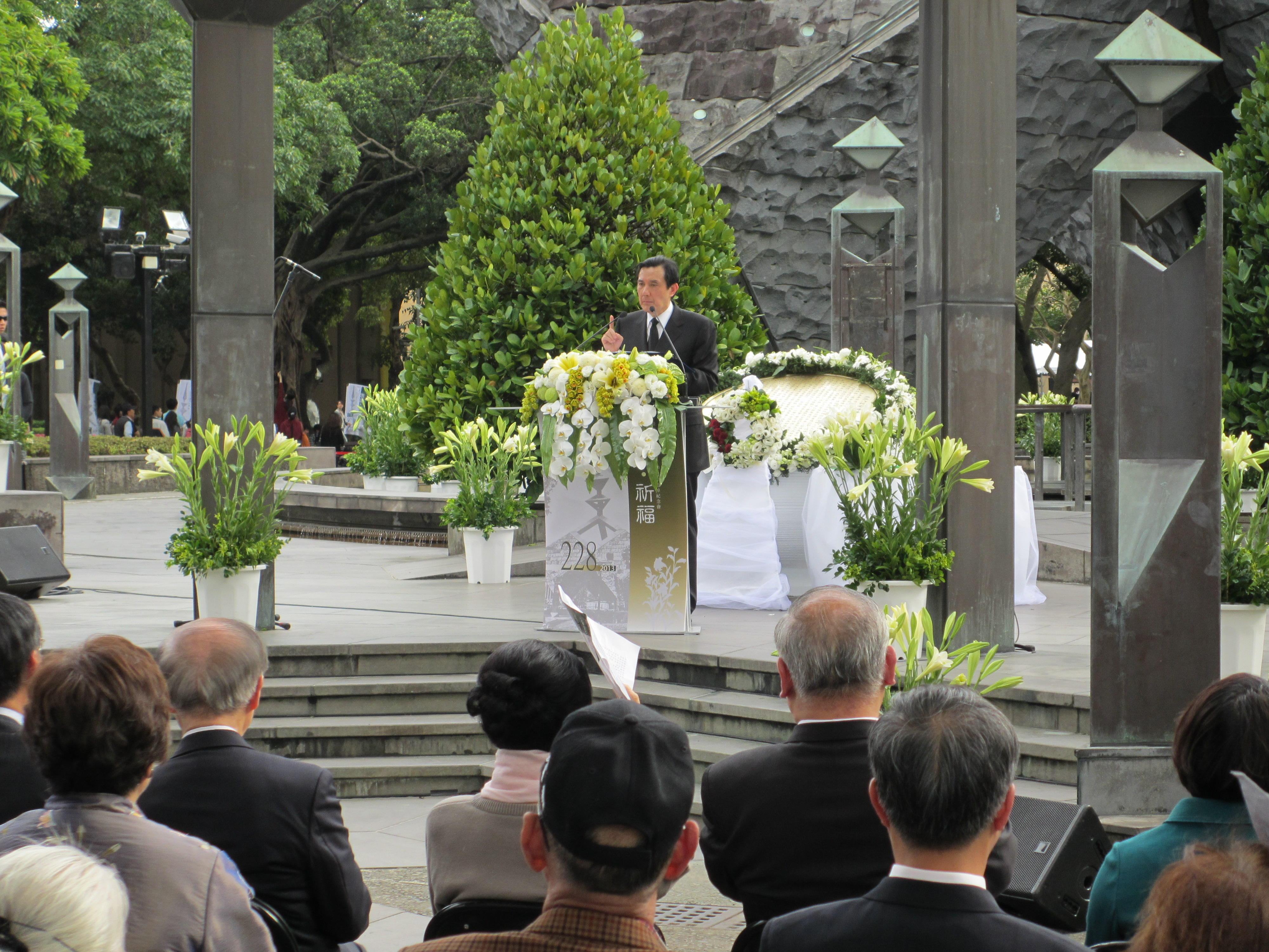 台灣官方舉辦紀念228事件活動。